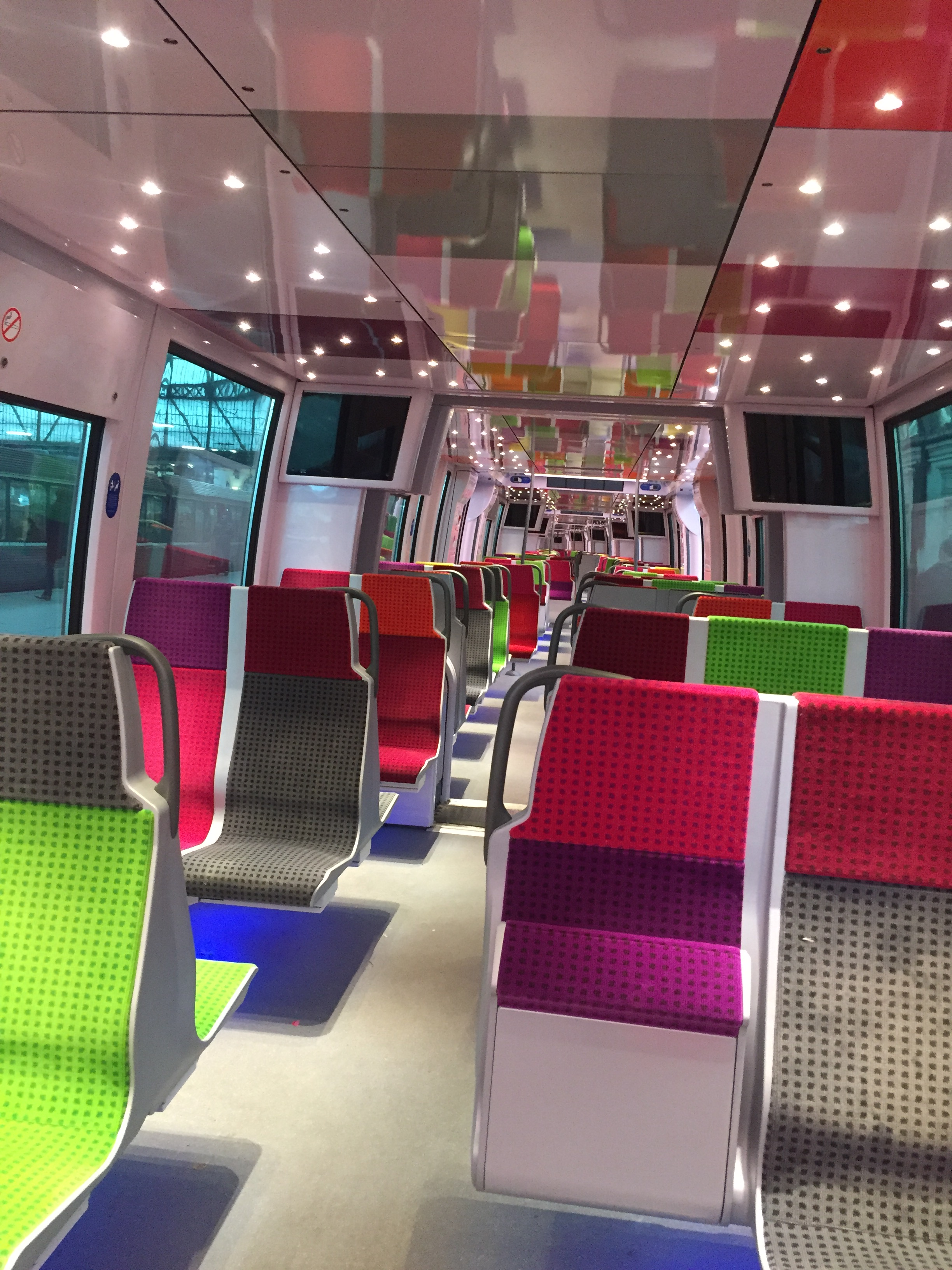 Intérieur Transilien